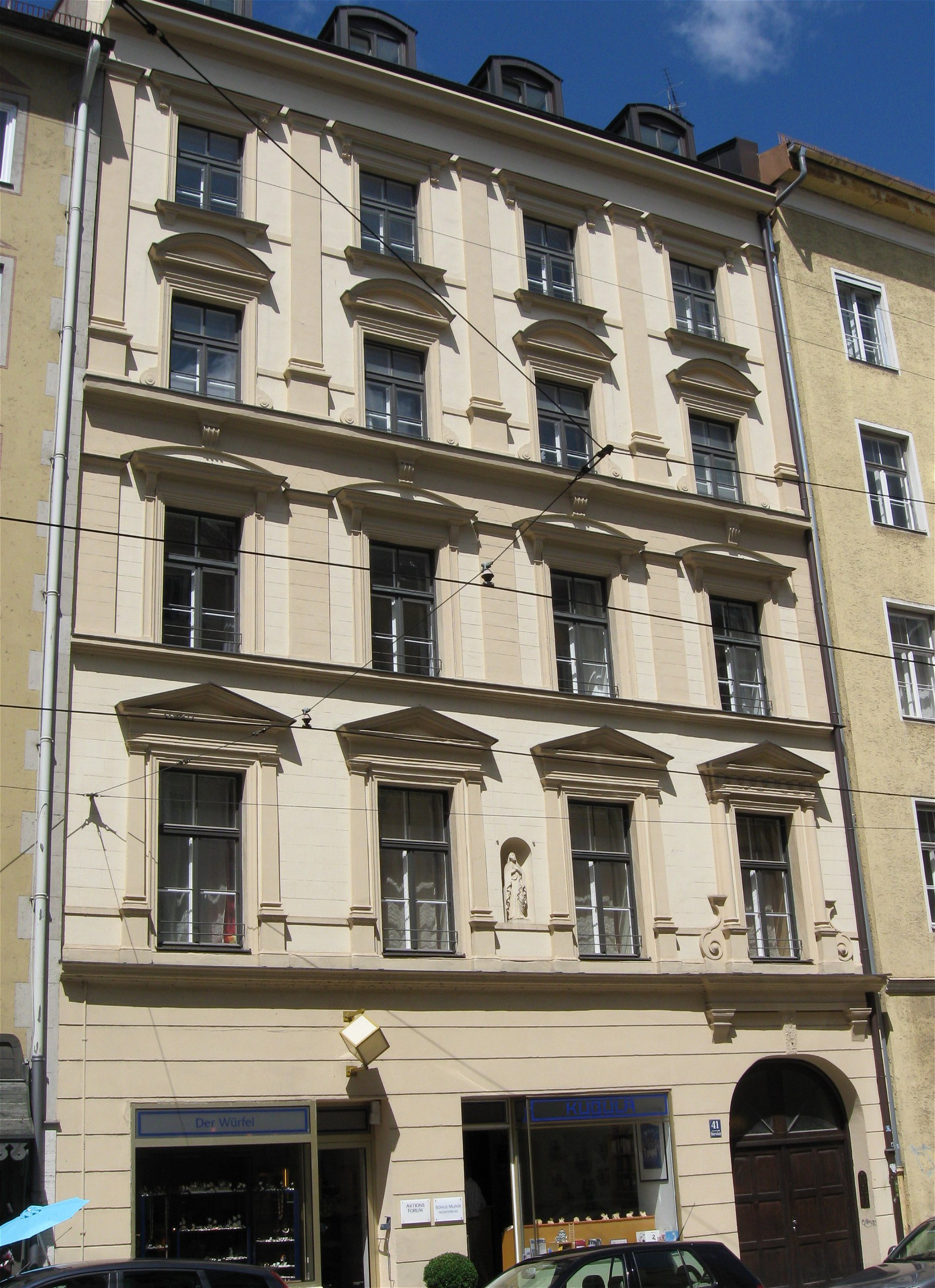 Thierschstraße 41; Mietshaus, klassische Renaissance, reich gegliedert, 1877-78 von Albert Schmidt.